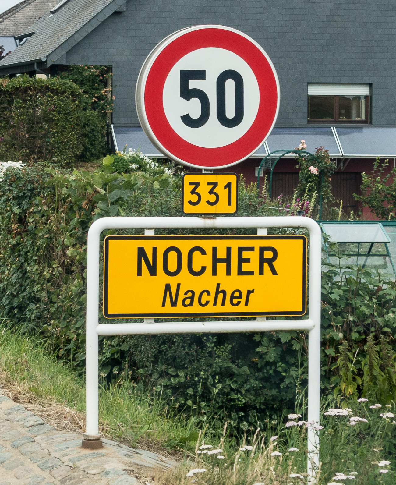 De CR331, d'Duerfstrooss zu Nacher.